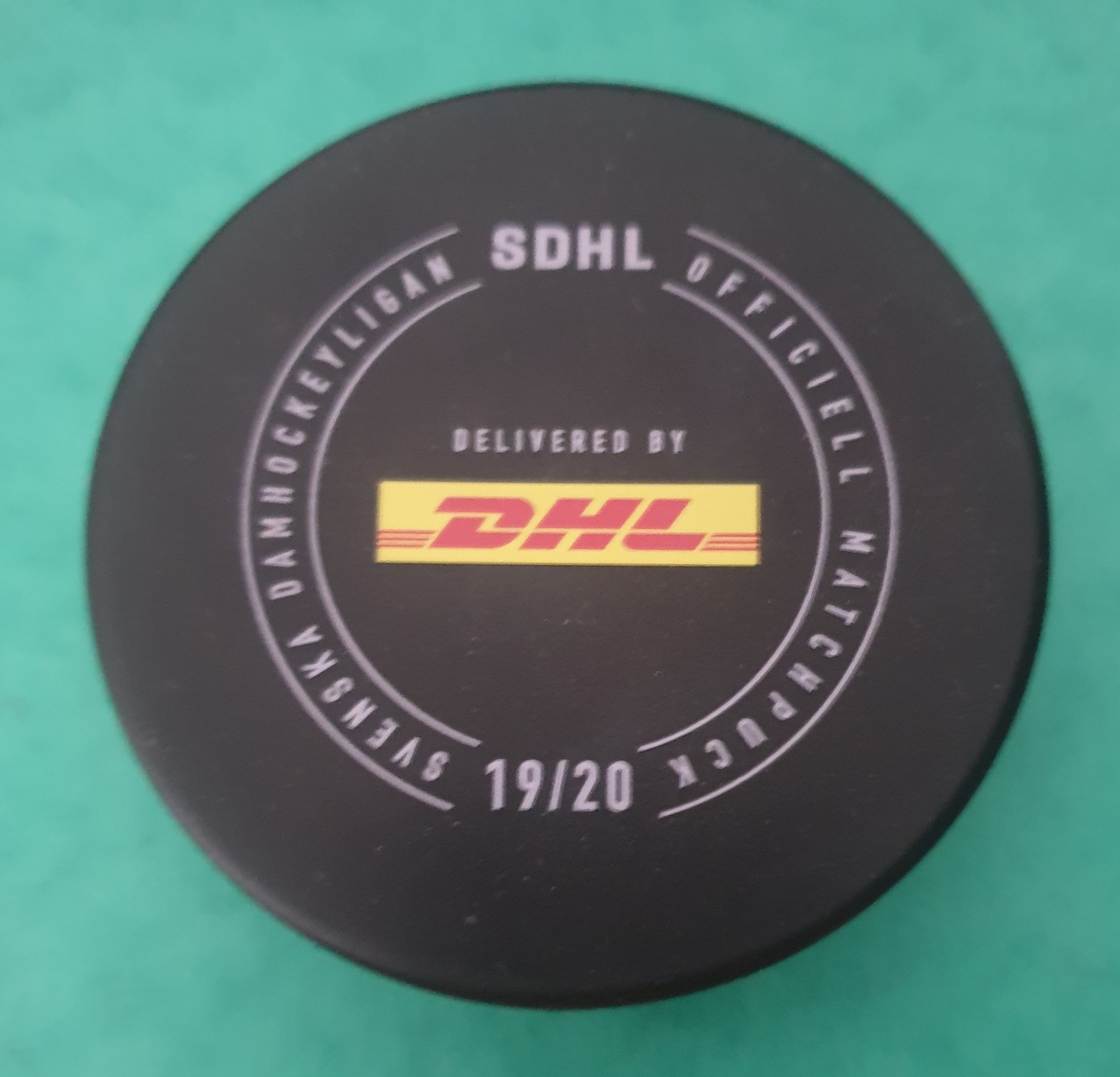 Matchpuck för Svenska damhockeyligan 2019/2020.